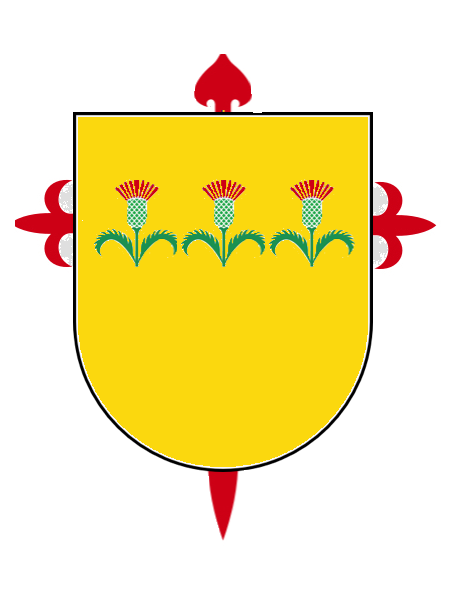 Armas de CARDONA sobre cruz de Santiago